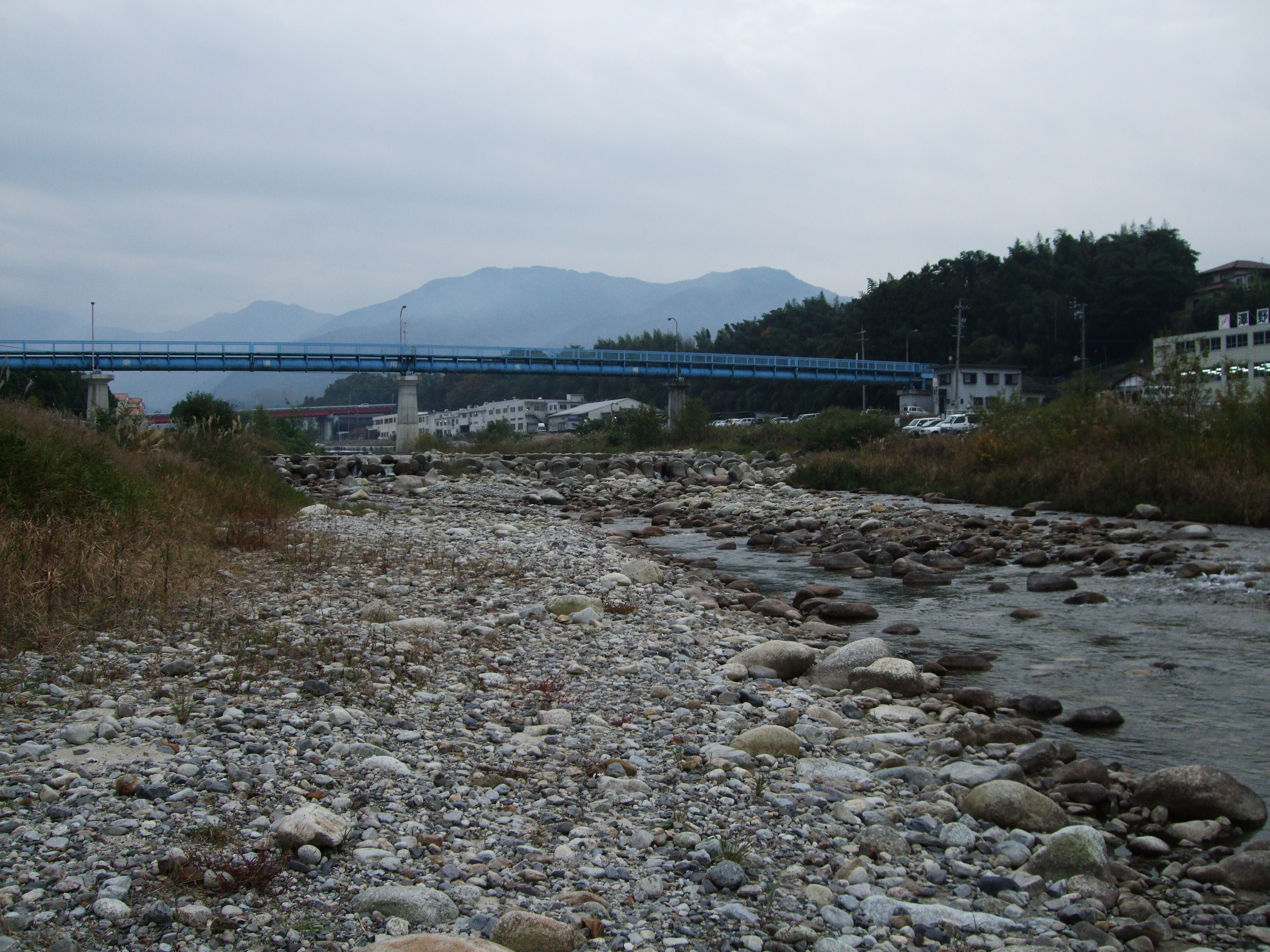 Nakatsu river in Nakatsugawa city,Gifu